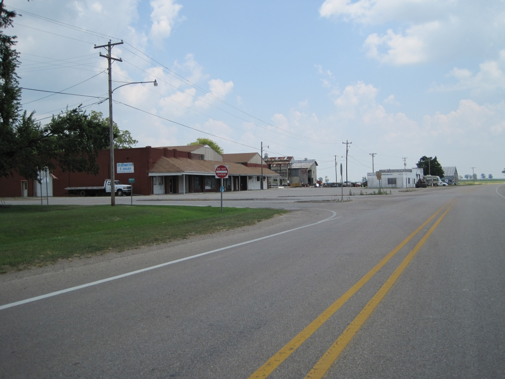 Bassett, Arkansas.